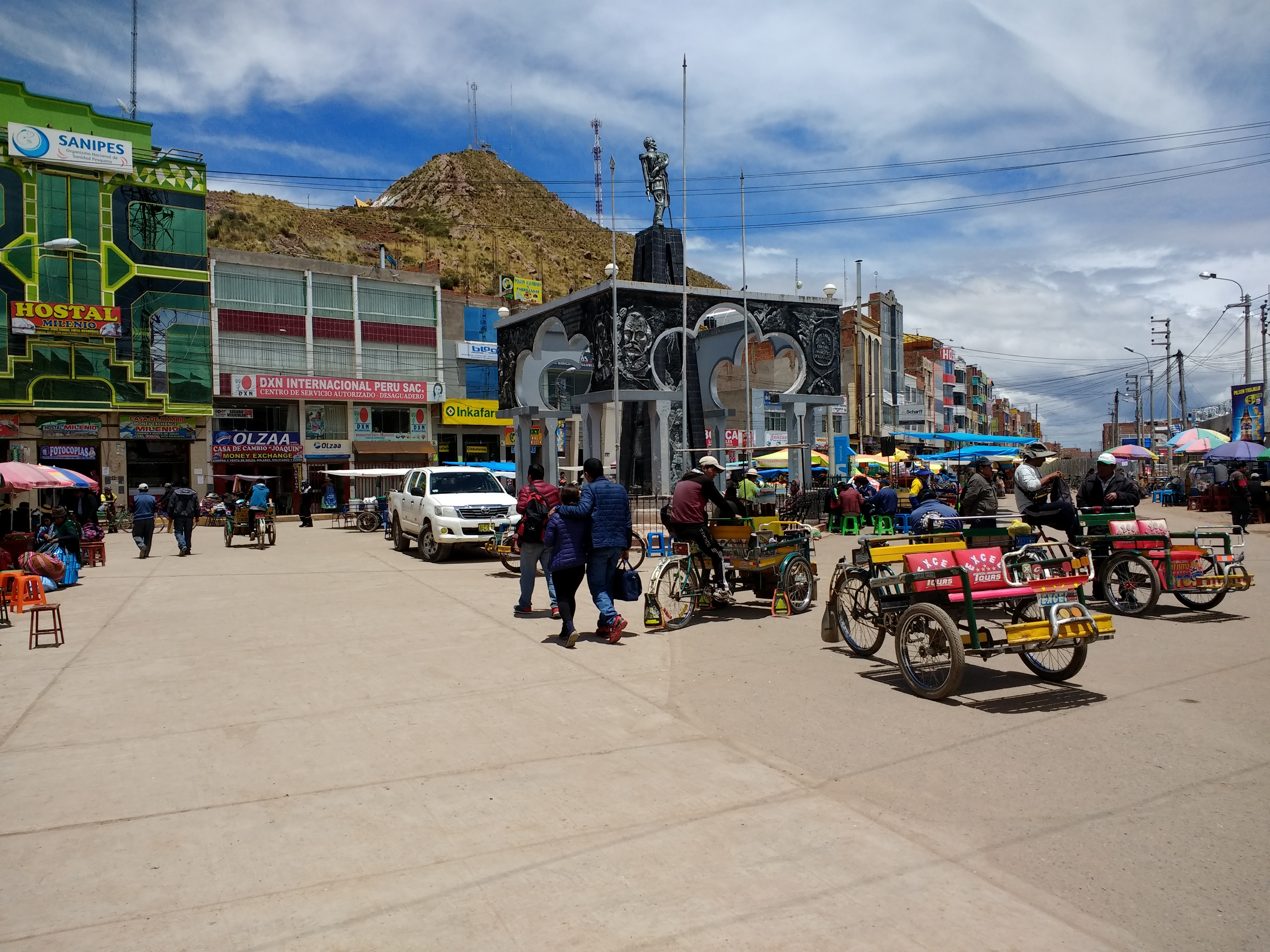 Desaguadero (el lado peruano, cerca de la frontera)